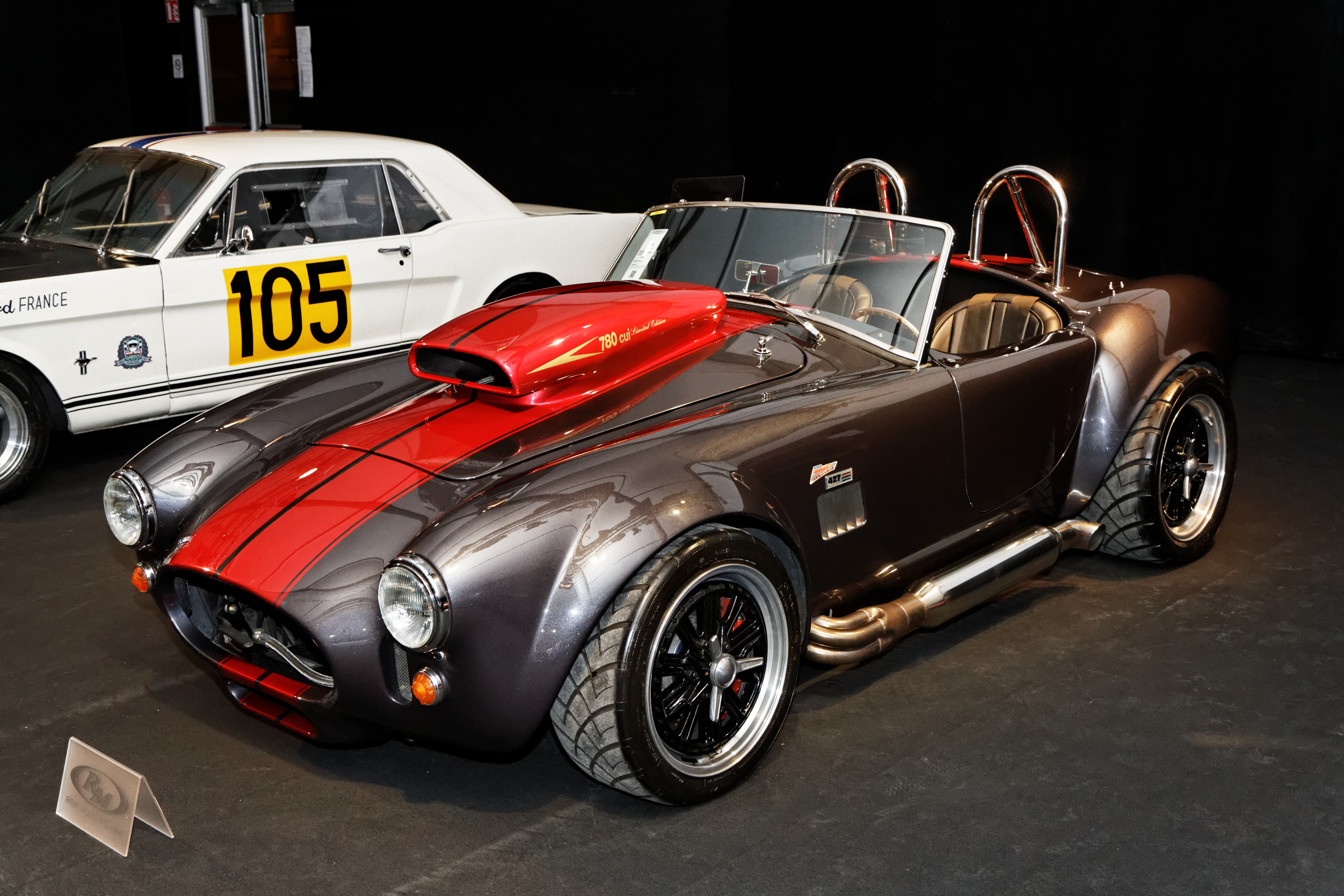 Une Weineck Cobra 780 CUI Limited Edition de 1985.